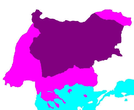 Bulgária 1942-ben